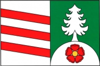 Těškov, vlajka. List tvoří dva svislé pruhy, bílý a zelený. V bílém pruhu tři červené kosmé pruhy vycházející z druhé, čtvrté a šesté osminy žerďového okraje do třetí, páté a sedmé osminy vlajícího okraje pruhu. V zeleném pruhu na dolním okraji listu bílý vrch s červenou růží se žlutým semeníkem. Z vrchu vyrůstá bílý smrk. Poměr šířky k délce listu je 2 : 3.